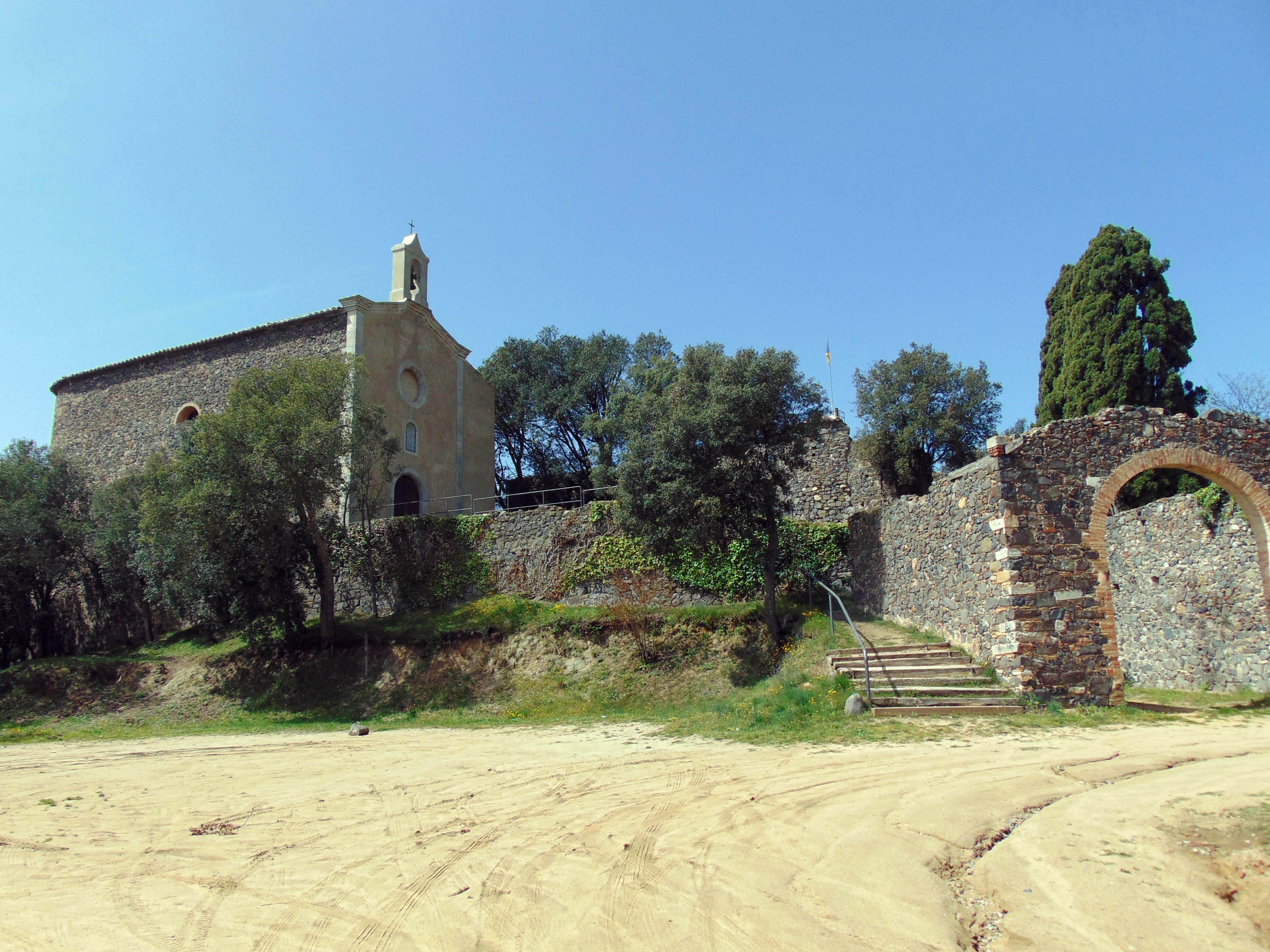 Església de Sant Maurici (Caldes de Malavella)